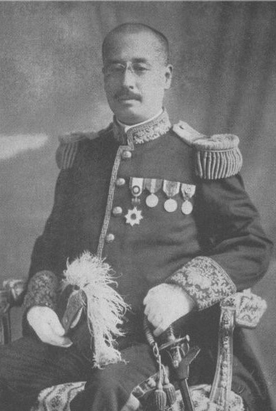 生駒親忠男爵